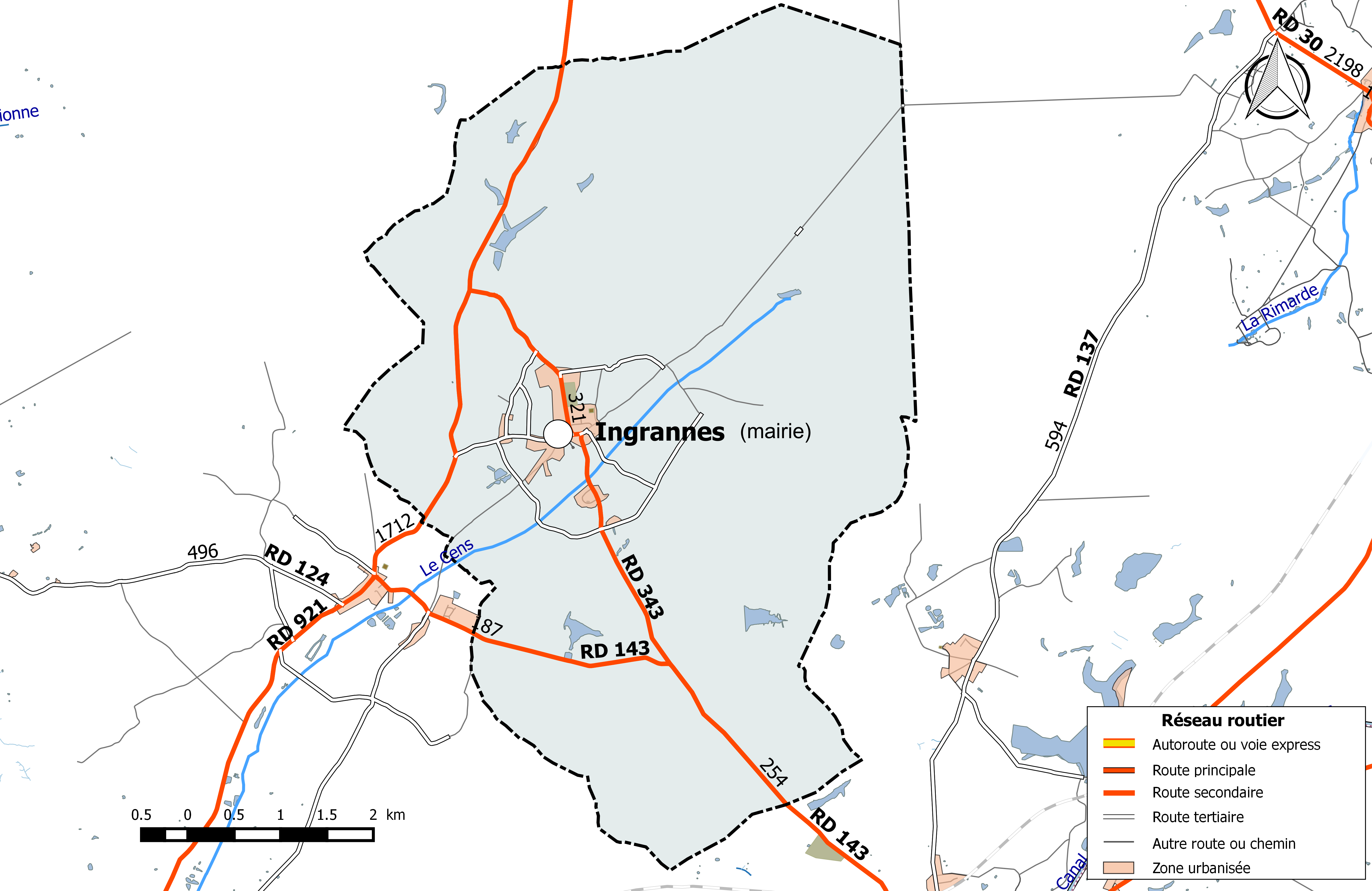 Carte du réseau routier de la commune de Ingrannes.